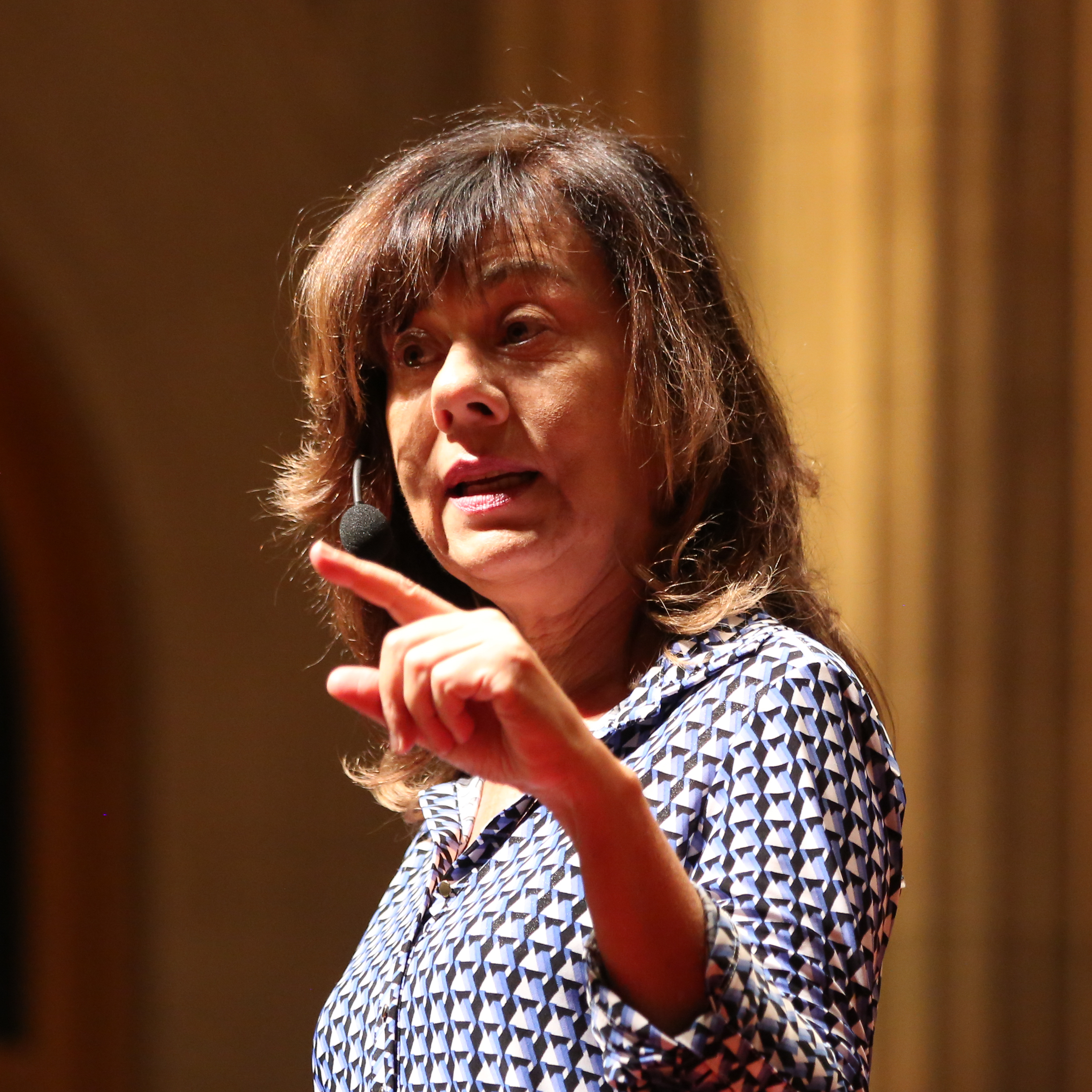 Marian Goldenberg lors du TEDxSao Paulo le 6 novembre 2017!